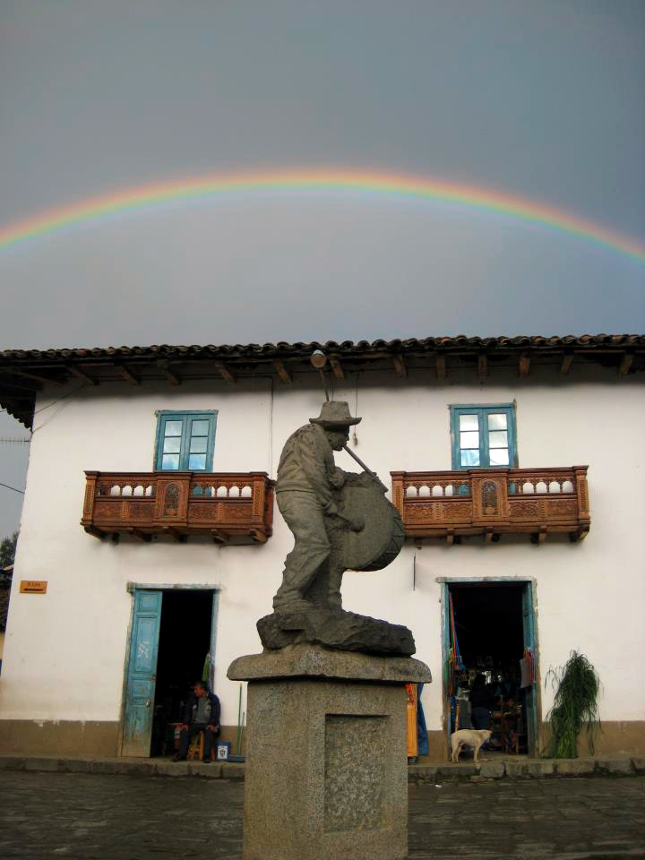 Estatua "Macuashcajero" en homenaje a los músicos del centro poblado de Macuash.